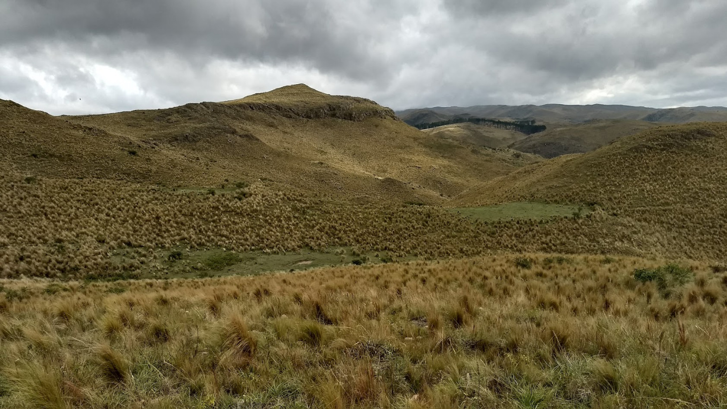 Cerro Alpatuaca en Argentina